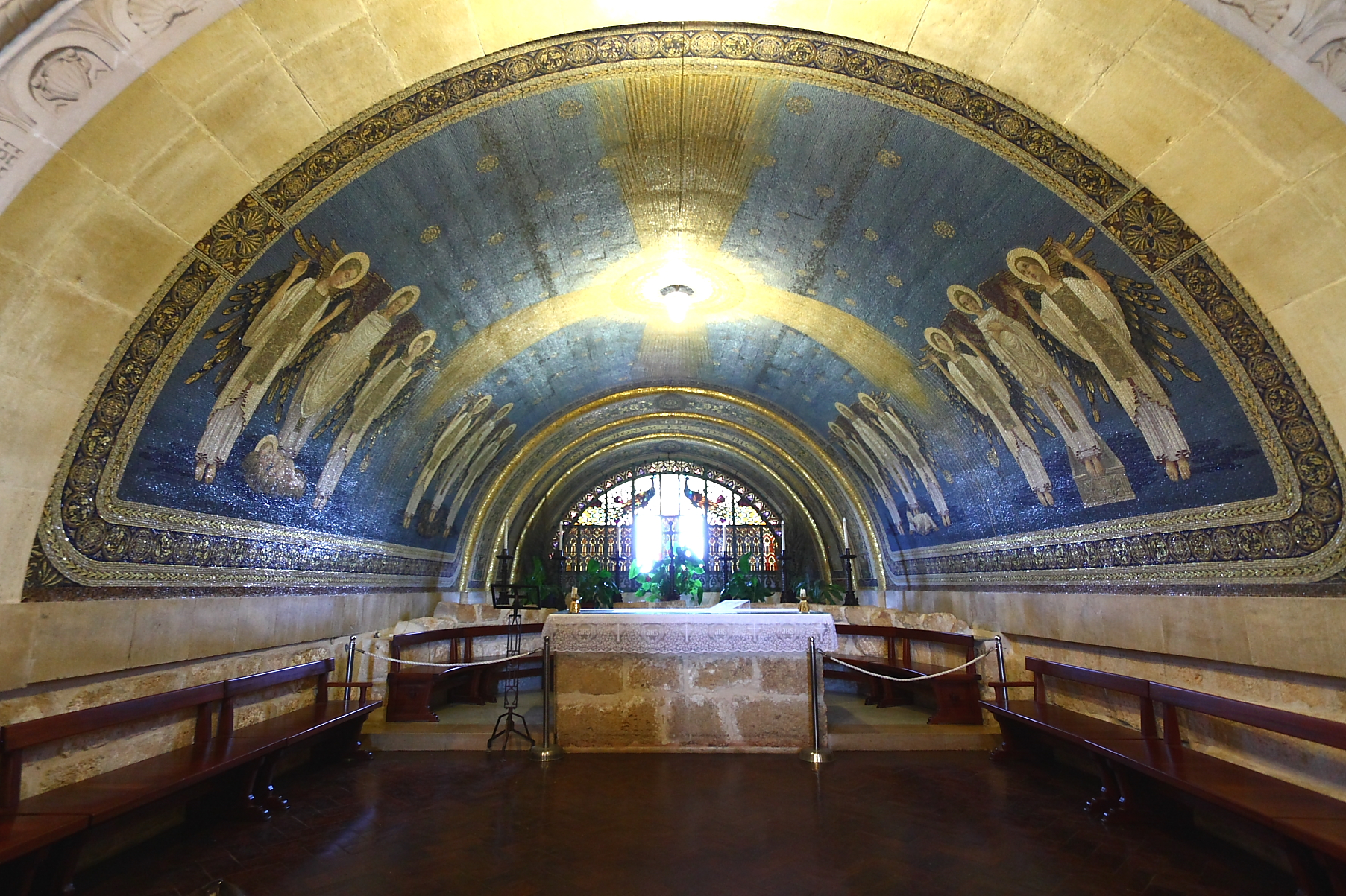 Главный престол в крипте католического храма Преображения на горе Фавор в Израиле.